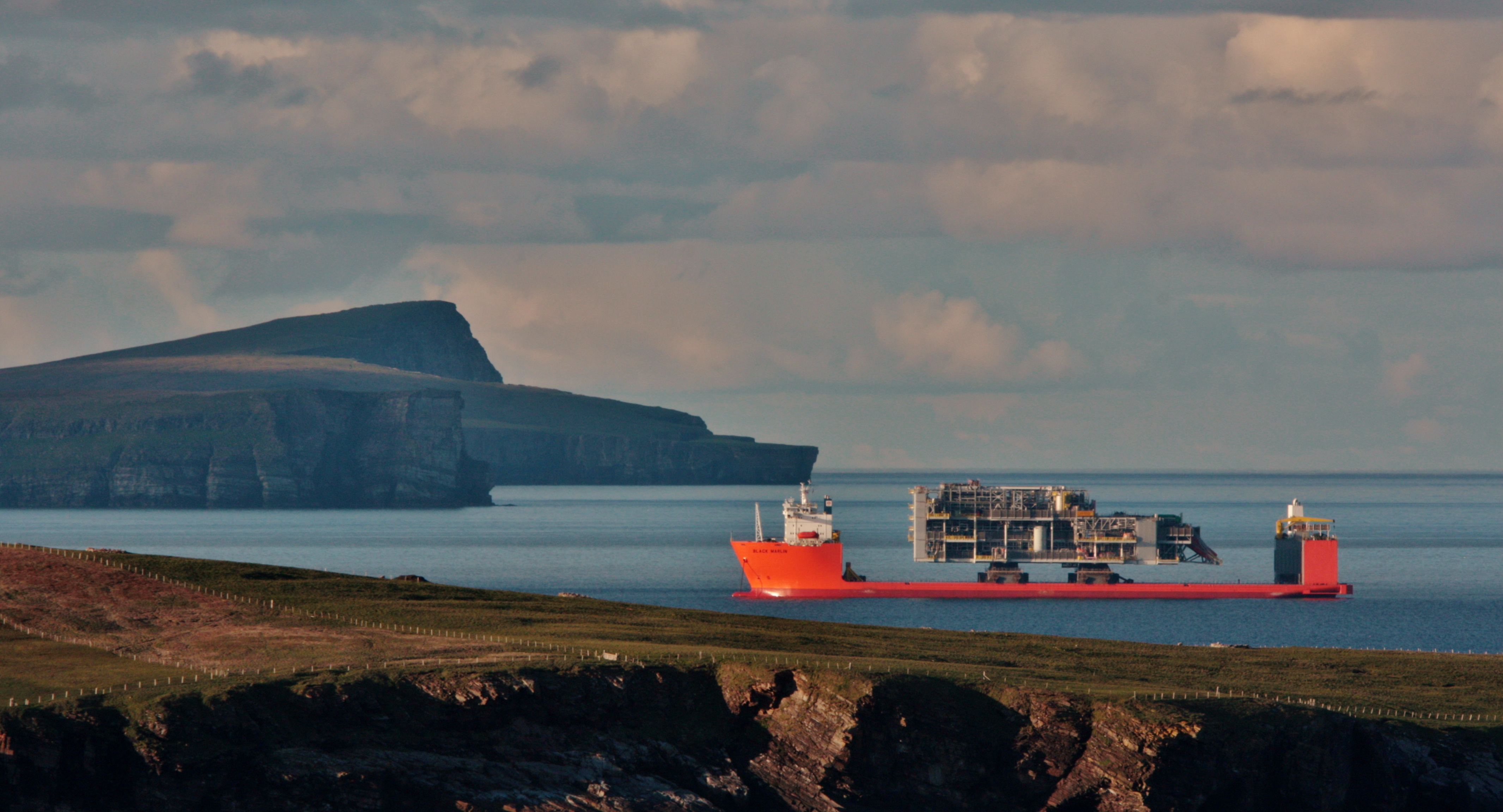 Off Cunningsburgh